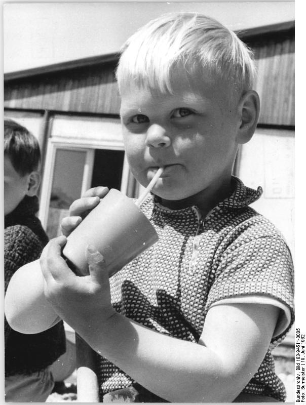 Steinhausen, Kindergartenkind Zentralbild Burmeister M-Qu 19.6.1962 Gemeinde Steinhausen - ein Beispiel für den steigenden Lebensstandard auf dem Lande. Ein Beispiel für den ständig steigenden Lebensstandard auch in den ländlichen Gemeinden der Republik liefert die Gemeinde Steinhausen im Kreise Wismar, die die Groß-LPG "Ernst Thälmann" mit 7 Ortsteilen umfasst. Ein Kulturhaus mit Kultursaal und den verschiedensten Zirkeln für eine sinnvolle Freizeitgestaltung, ein Wäschestützpunkt, eine Kinderkrippe, mehrere Kindergärten in einigen Ortsteilen, eine Dorfakademie und eine mehrere tausend Bände umfassende Bibliothek gehören zu der großen Anzahl der kulturellen und sozialen Einrichtungen dieser Gemeinde. Auch an der ständig steigenden Zahl der Fernsehgeräte, Motorräder, Autos und Mopeds lässt sich der Reichturm der Genossenschaftsbauern messen. 22 PKW, 77 Motorräder und Mopeds sowie 81 Fernsehgeräte sind gegenwärtig in der Gemeinde registriert. UBz: Ein Leben in Frieden ohne Sorgen hat der kleine Wolfgang Zarbitz im Kindergarten Steinhausen, während sein Vater als Traktorist in der LPG und seine Mutti als Genossenschaftsbäuerin ihre Arbeit verrichten.